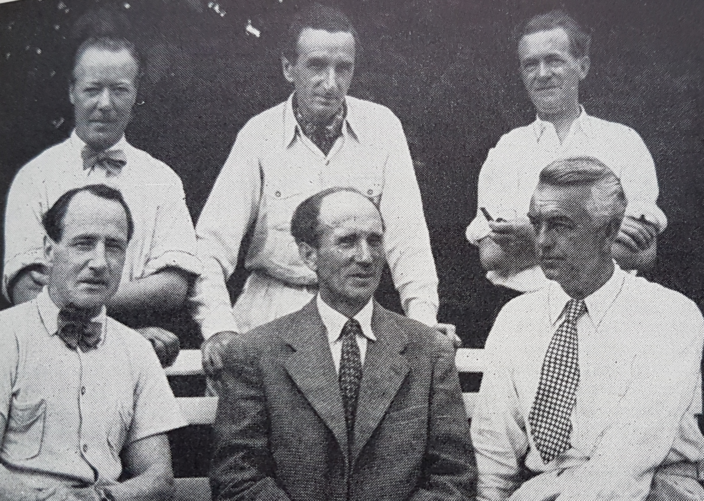 Halmstadgruppen. Stående från vänster Esaias Thorén, Axel Olson, Sven Jonson, sittande Etik Olson, Valdemar Lorentzon och Stellan Mörner. , avfotograferad porträttbild från Allhems Svenskt konstnärslexikon.